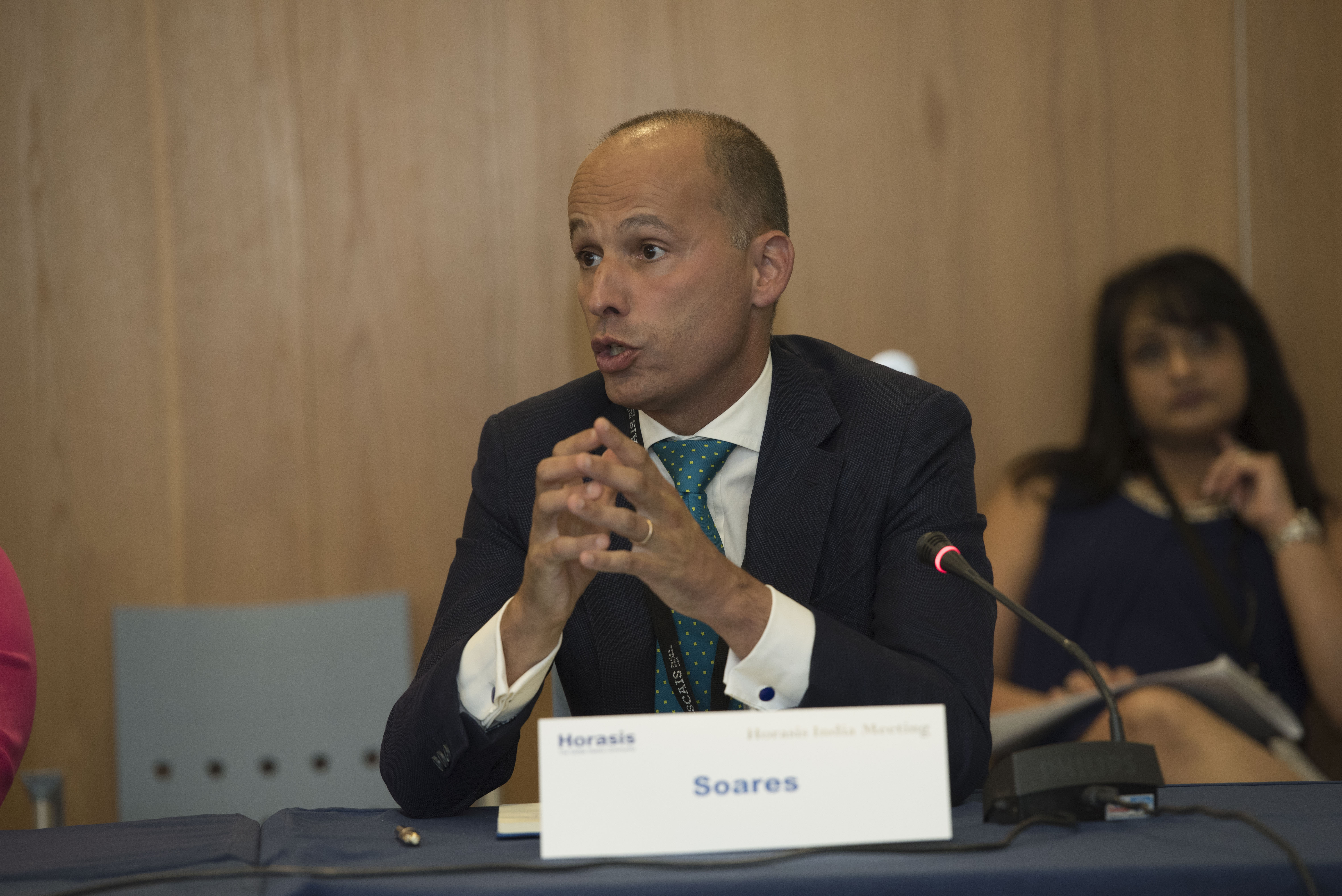 Horasis India Meeting, Cascais, Portugal, 3-4 July